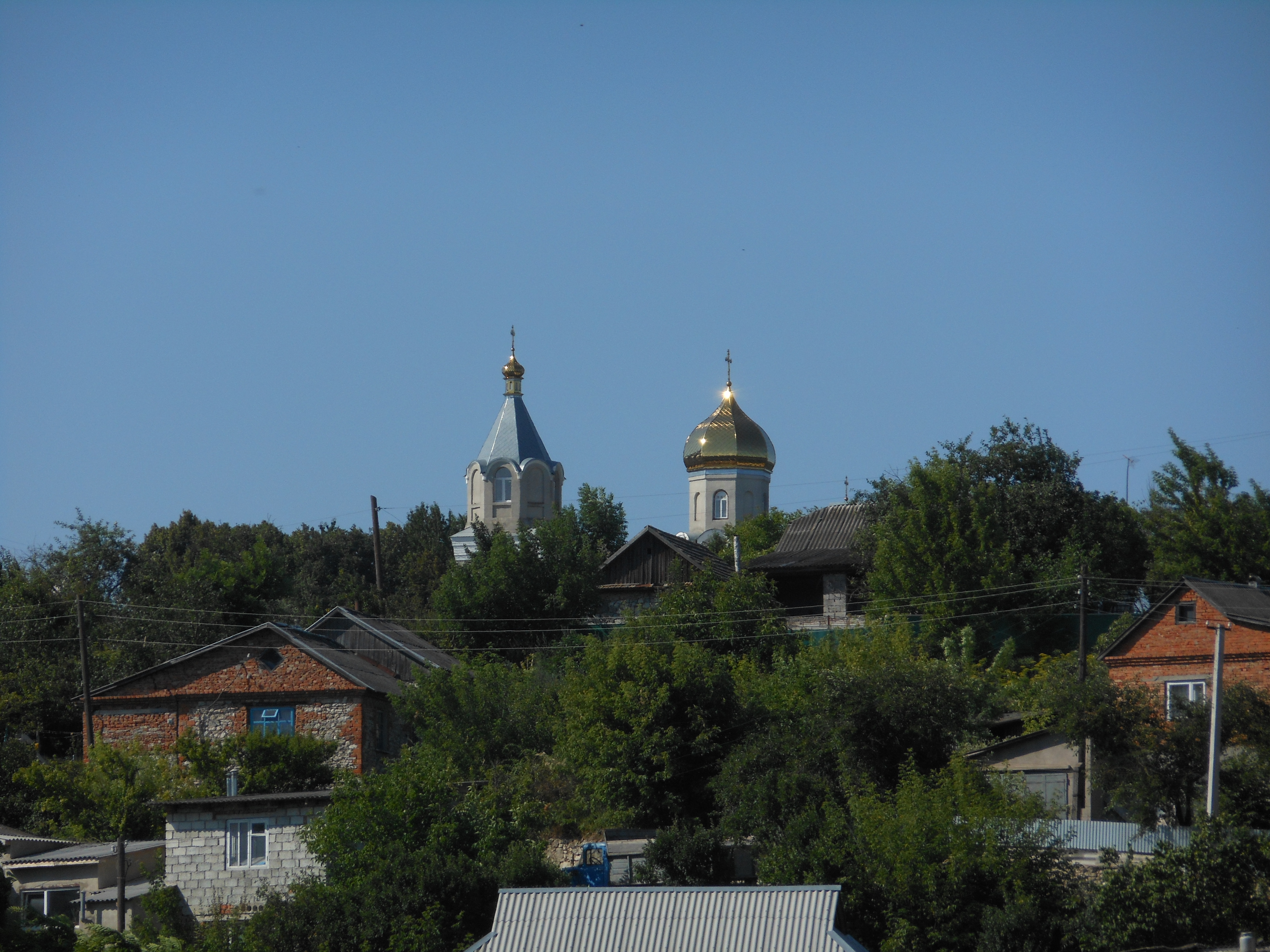 Здвиженська церква, село Маків